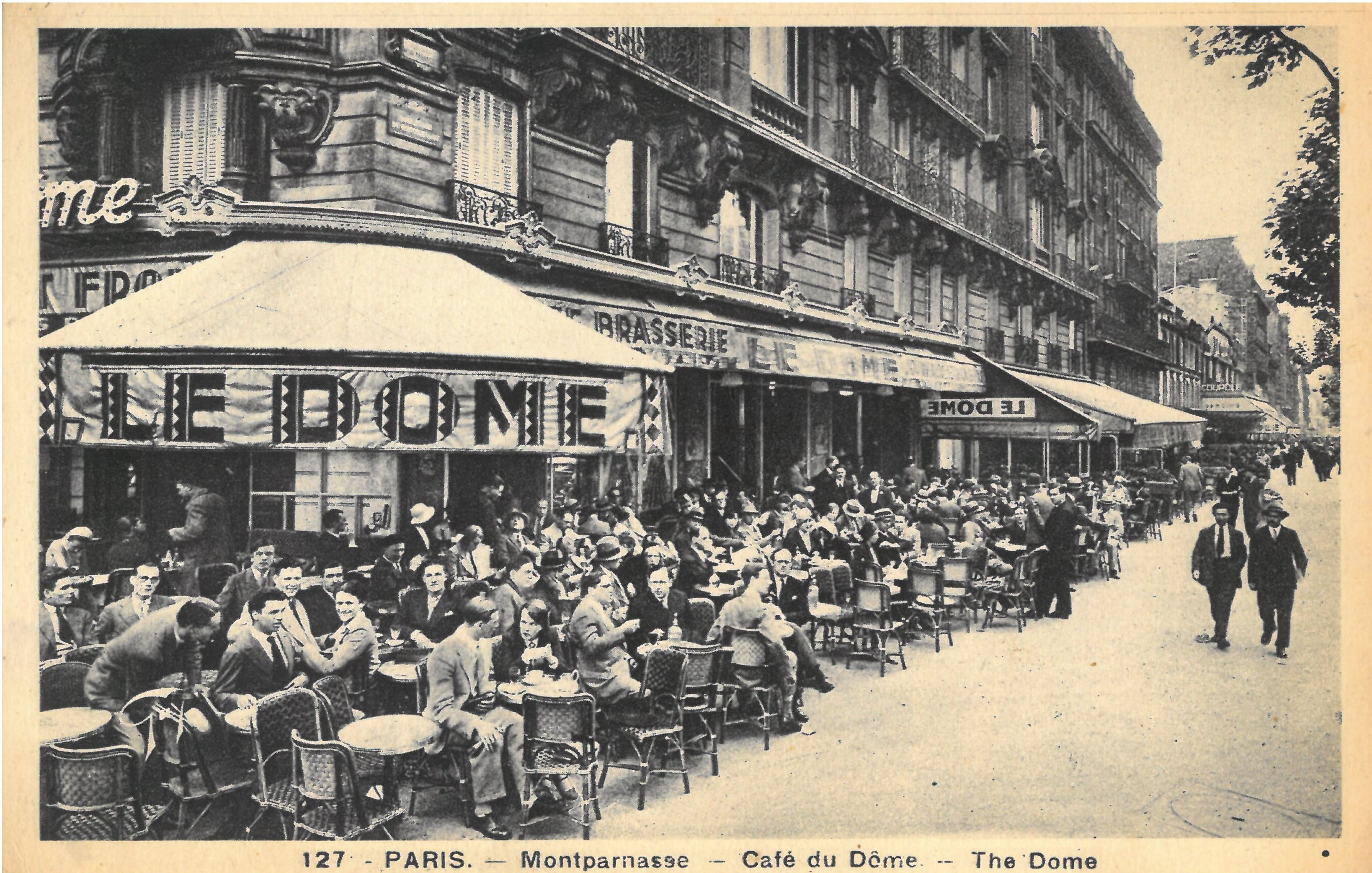 Paris Montparnasse : Café du Dôme. (Carte postale A. Leconte, Paris)